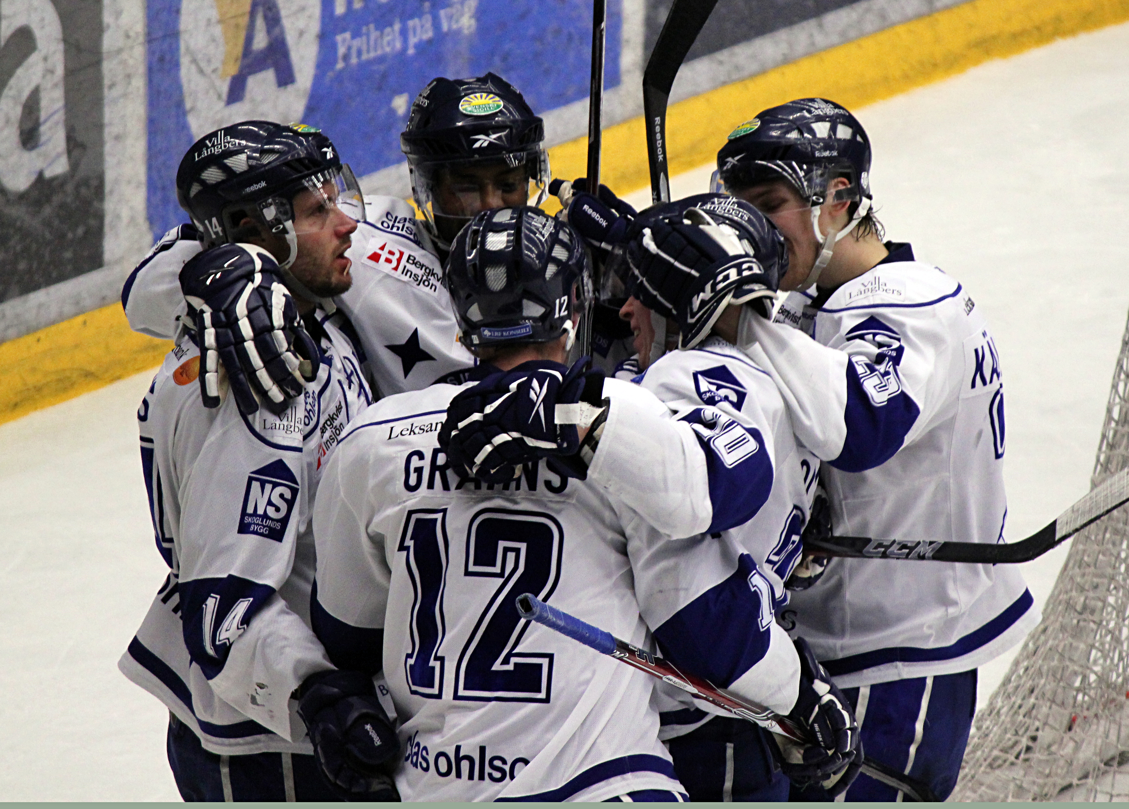 Omkramning efter mål av Leksands IF mot VIK Västerås HK 29 januari 2011.